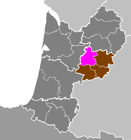 Maps of arrondissements and cantons of France: Département de Lot-et-Garonne - Arrondissement de Marmande.PNG (Région Aquitaine)